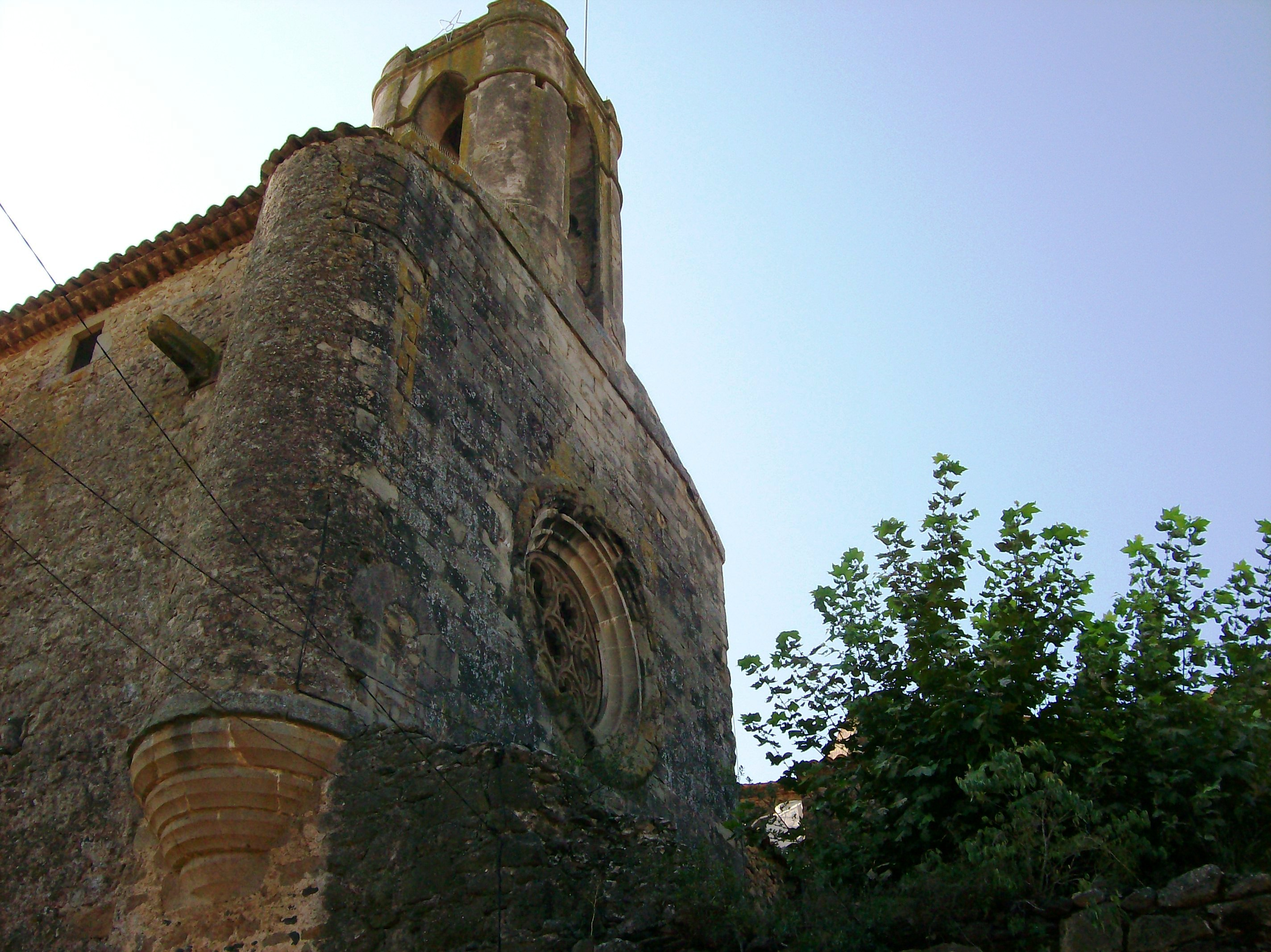 Замок Пуболь, который Дали подарил Гала